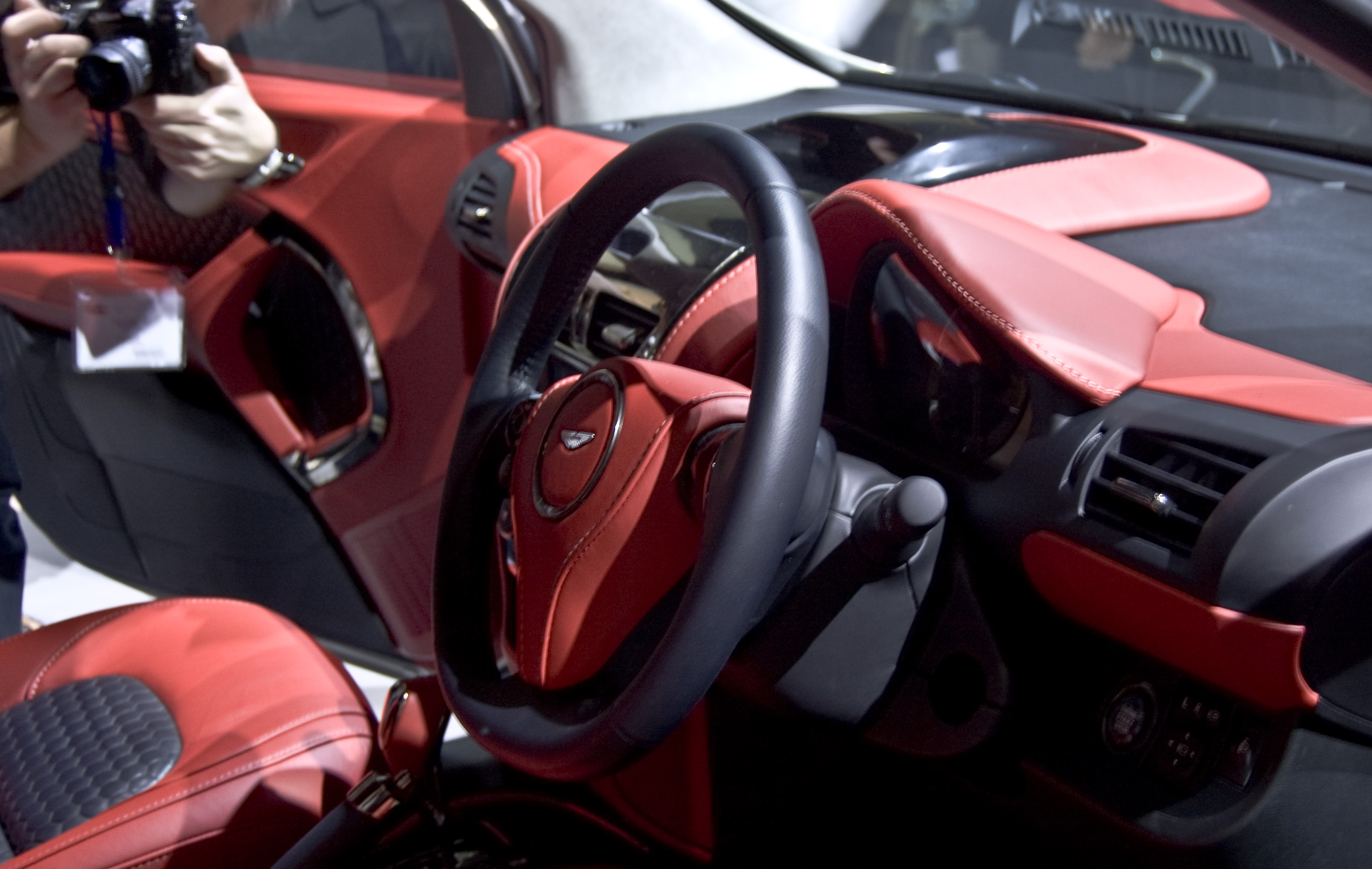 Aston Martin Cygnet en el Salón de Ginebra 2010.